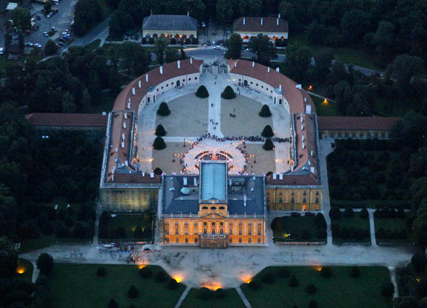 Éjszakai légi fotó a fertődi Esterházy-kastélyról